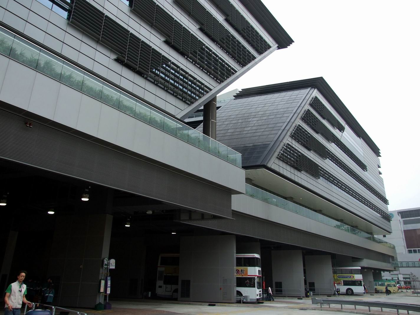 九龍塘公共交通交匯處